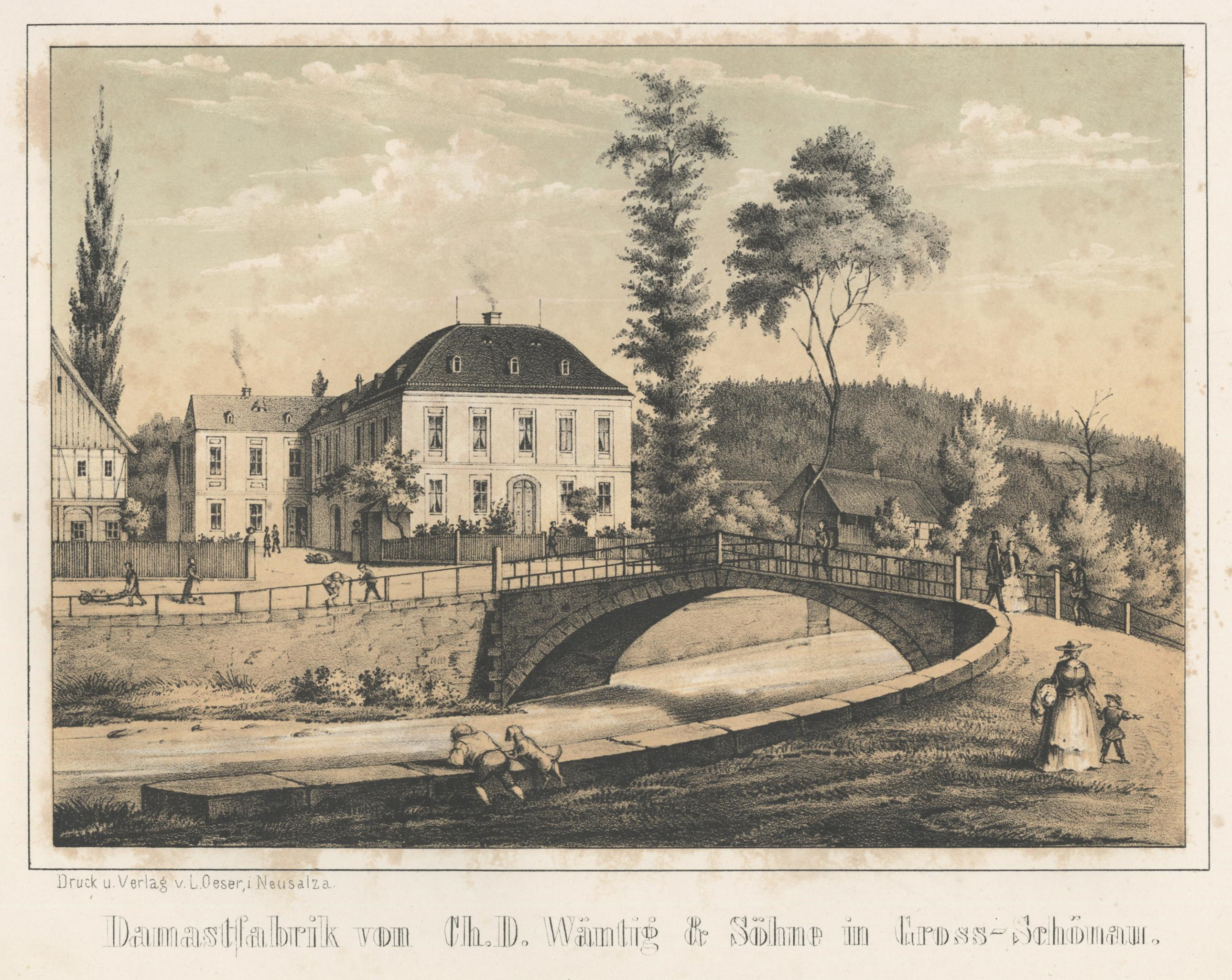 Damastfabrik von Ch. D. Wäntig & Söhne in Gross-Schönau aus: Album der Sächsischen Industrie Erster Band